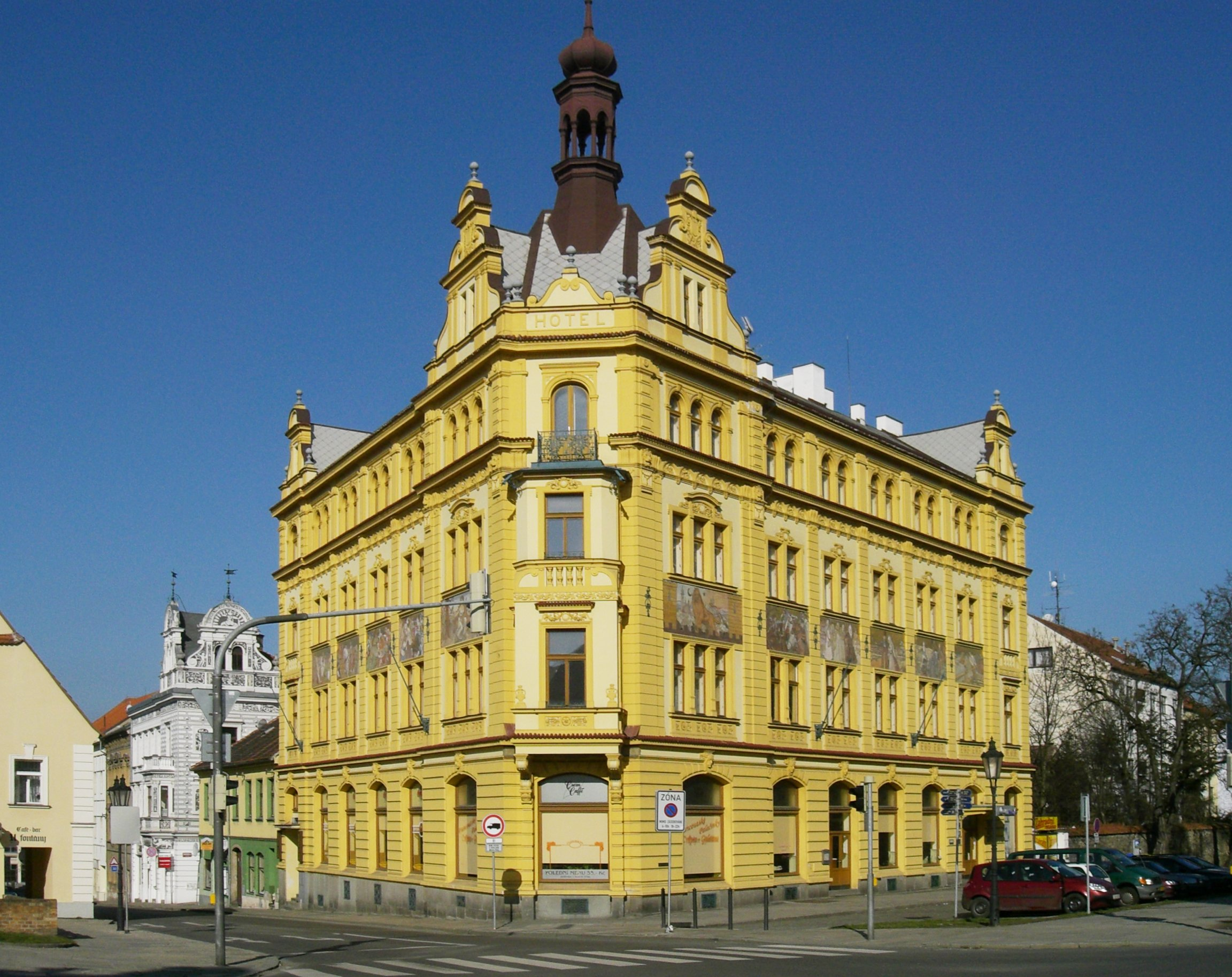 Hotel Otava na rohu Komenského a Chelčického ulice, Písek, CZ